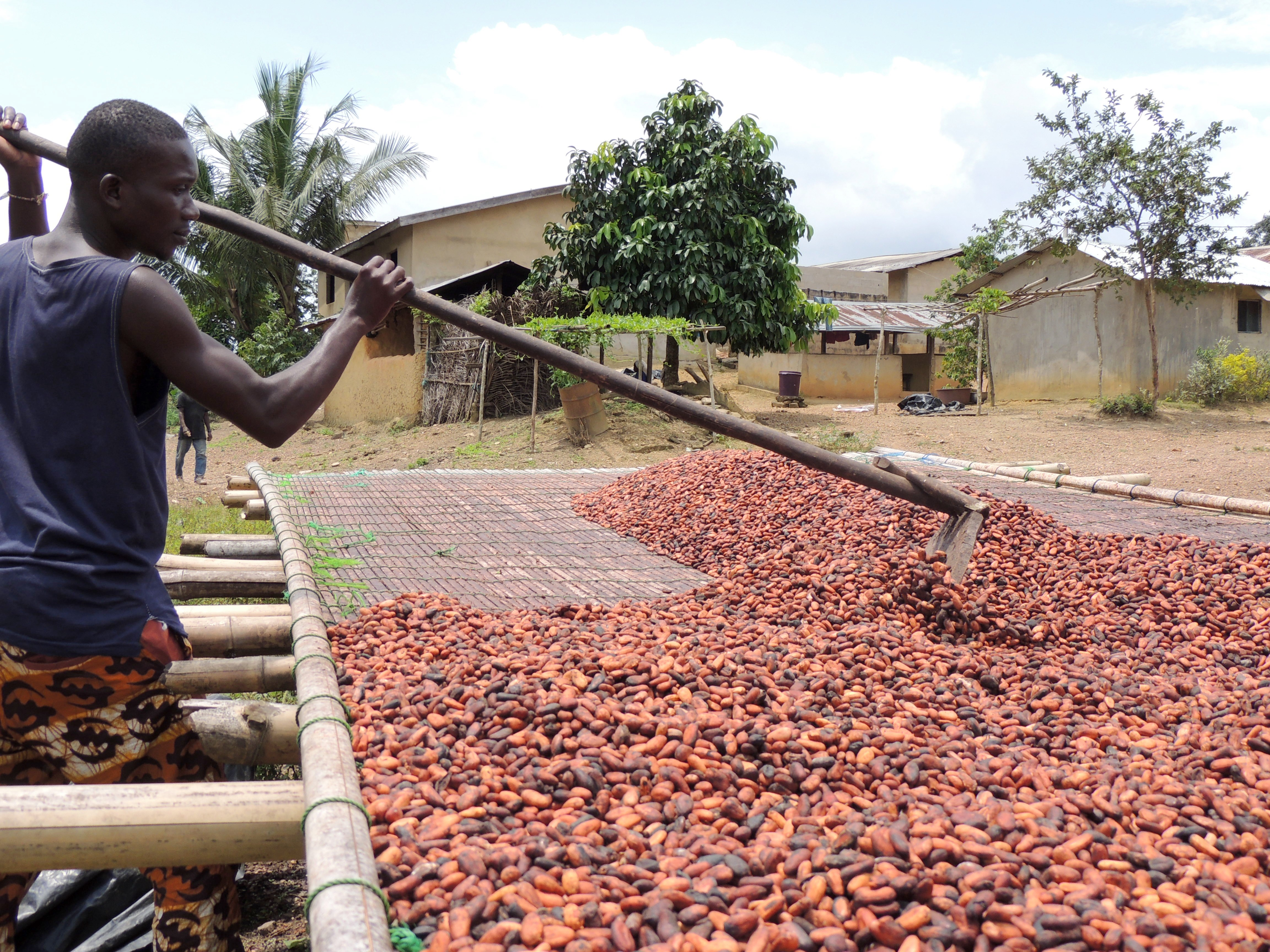 Cultivateur de cacao ivoirien en train de répandre les fèves de cacao pour les faire sécher au soleil. This is an image of "African people at work" from Ivory Coast